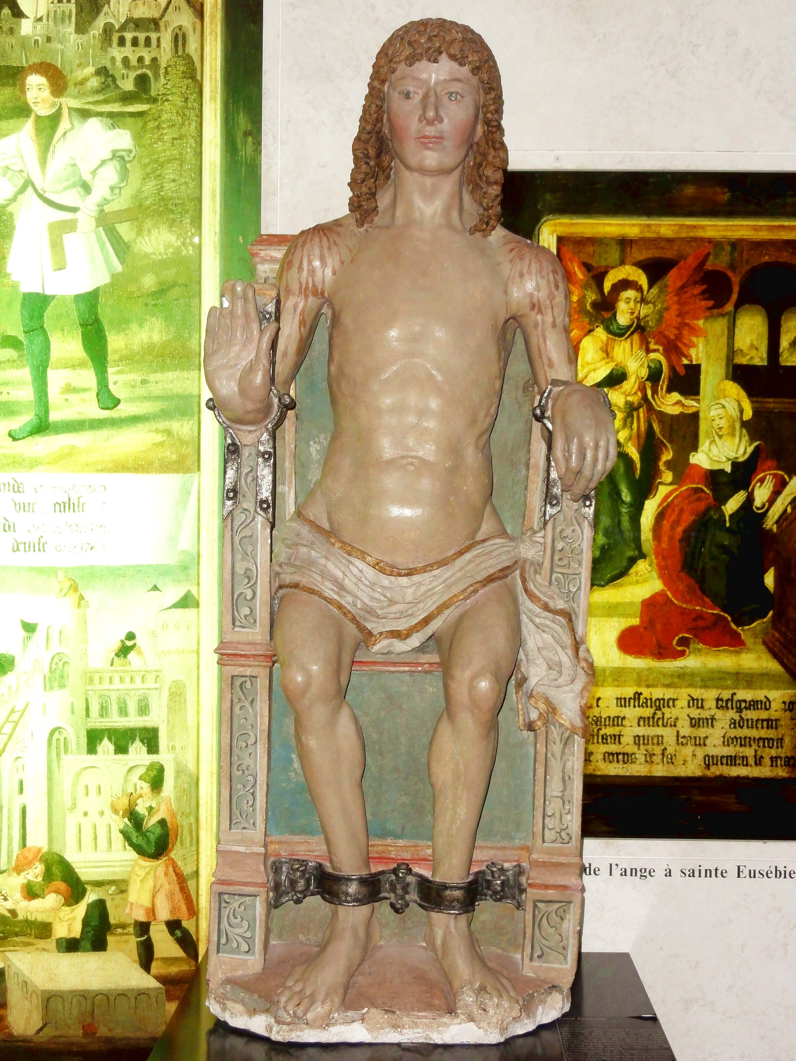 Statue de saint Quentin, première moitié XVIe siècle.